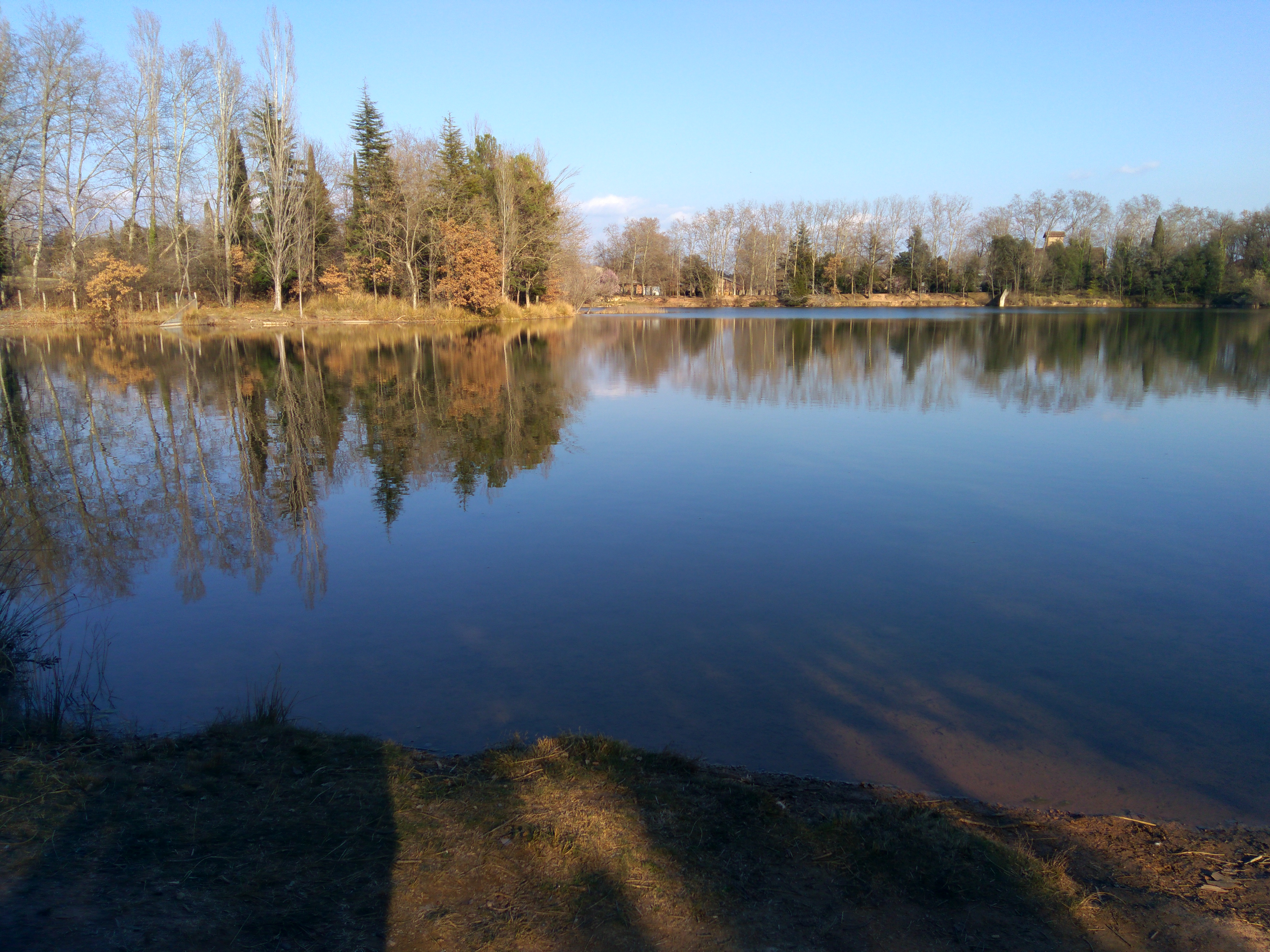 Llac de Graugés.